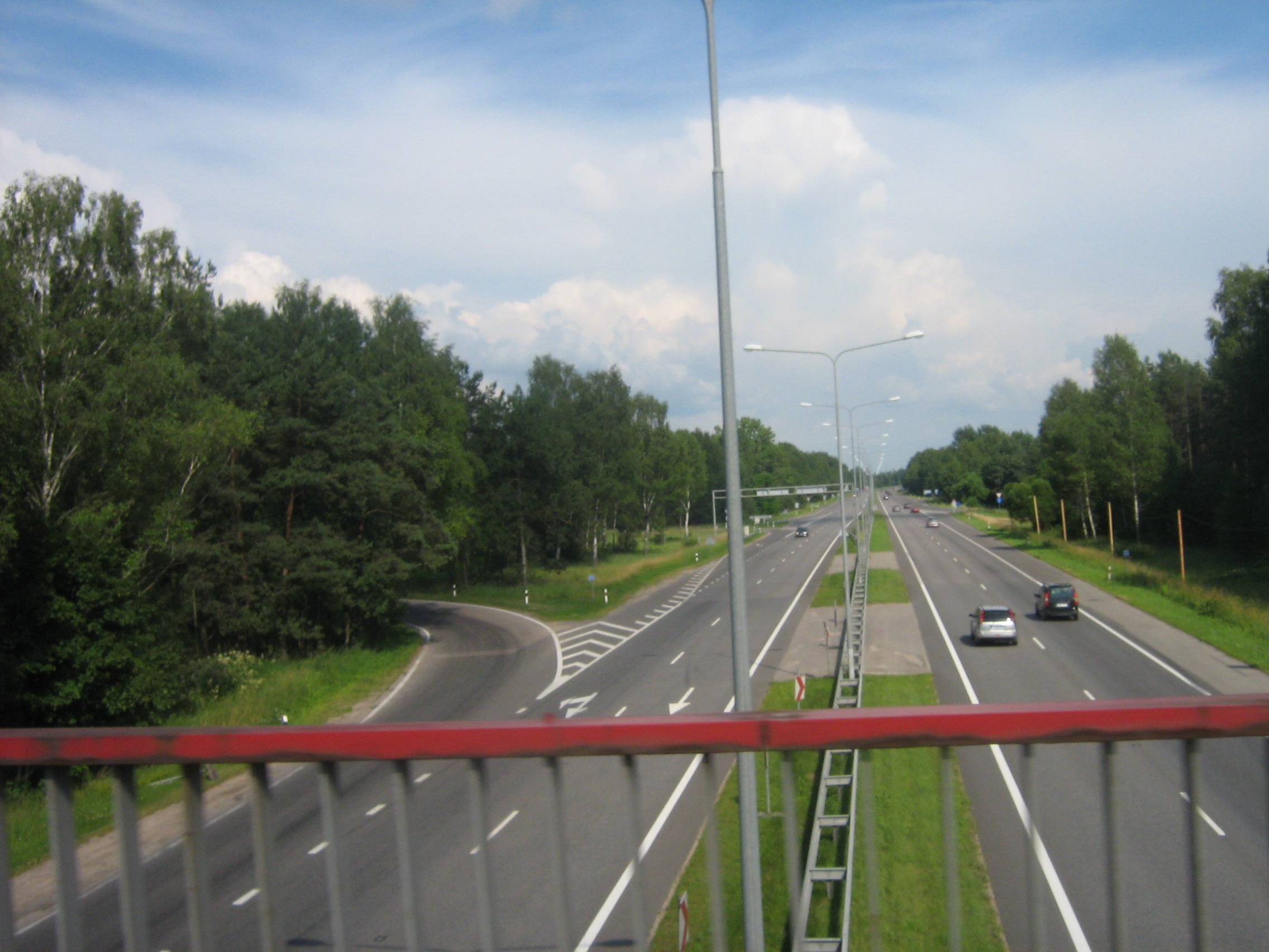 A1